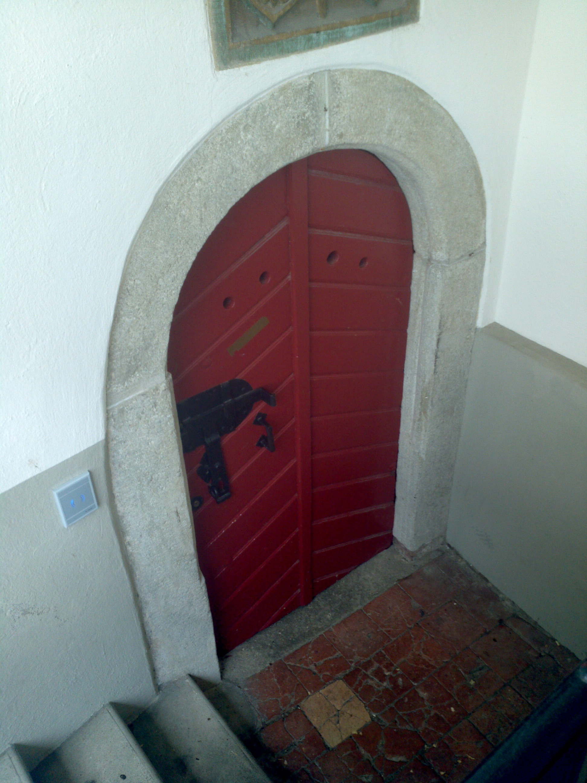 Eingangstür zur Trotte im Langhaus des Klosters Wettingen